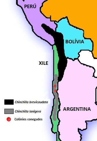 Mapa de les poblacions de xinxilles a Sud-amèrica.